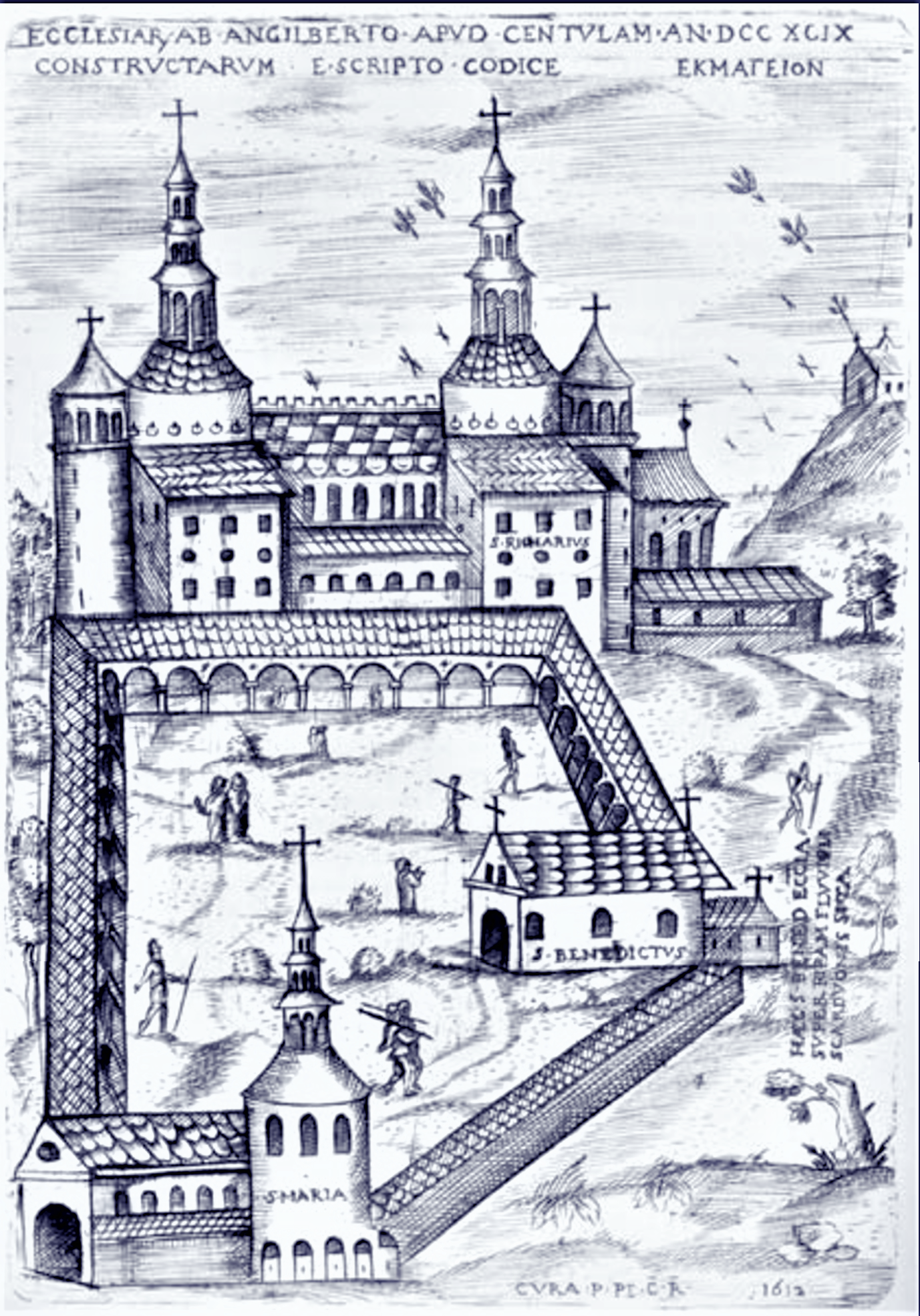 Abbaye de Saint-Riquier, perspertive (image du domaine public modifiée)